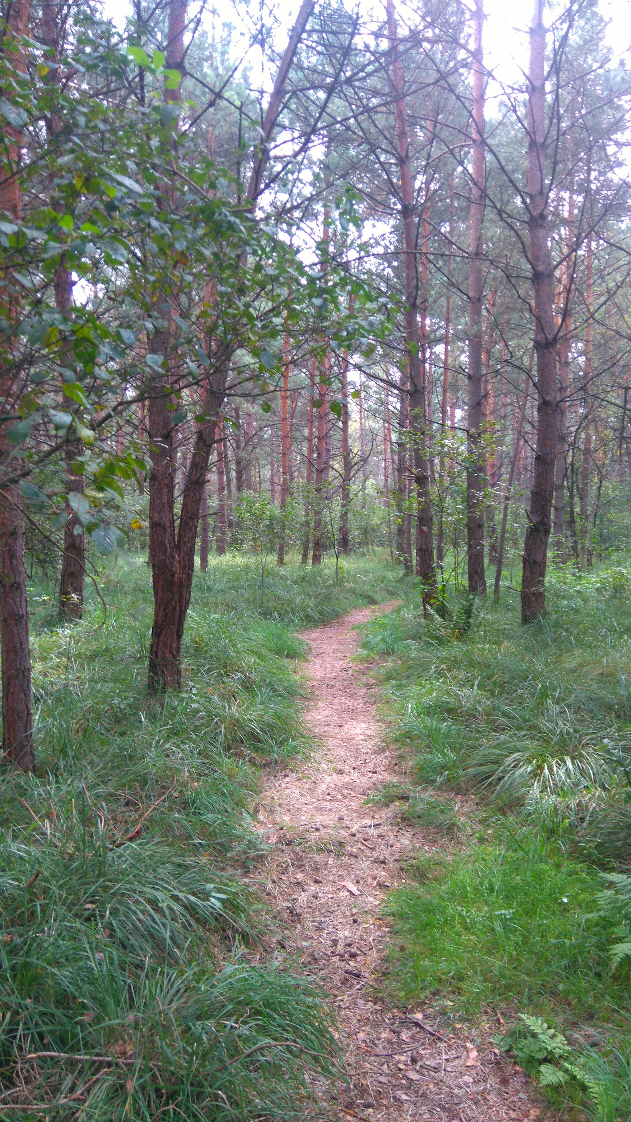 Ścieżka przyrodnicza przecinająca las sosnowy na terenie rezerwatu Broduszurki.